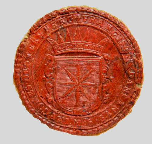 Pečeť František Damián Šternberk (1667-1723) zakladatel Šternberského paláce v Praze